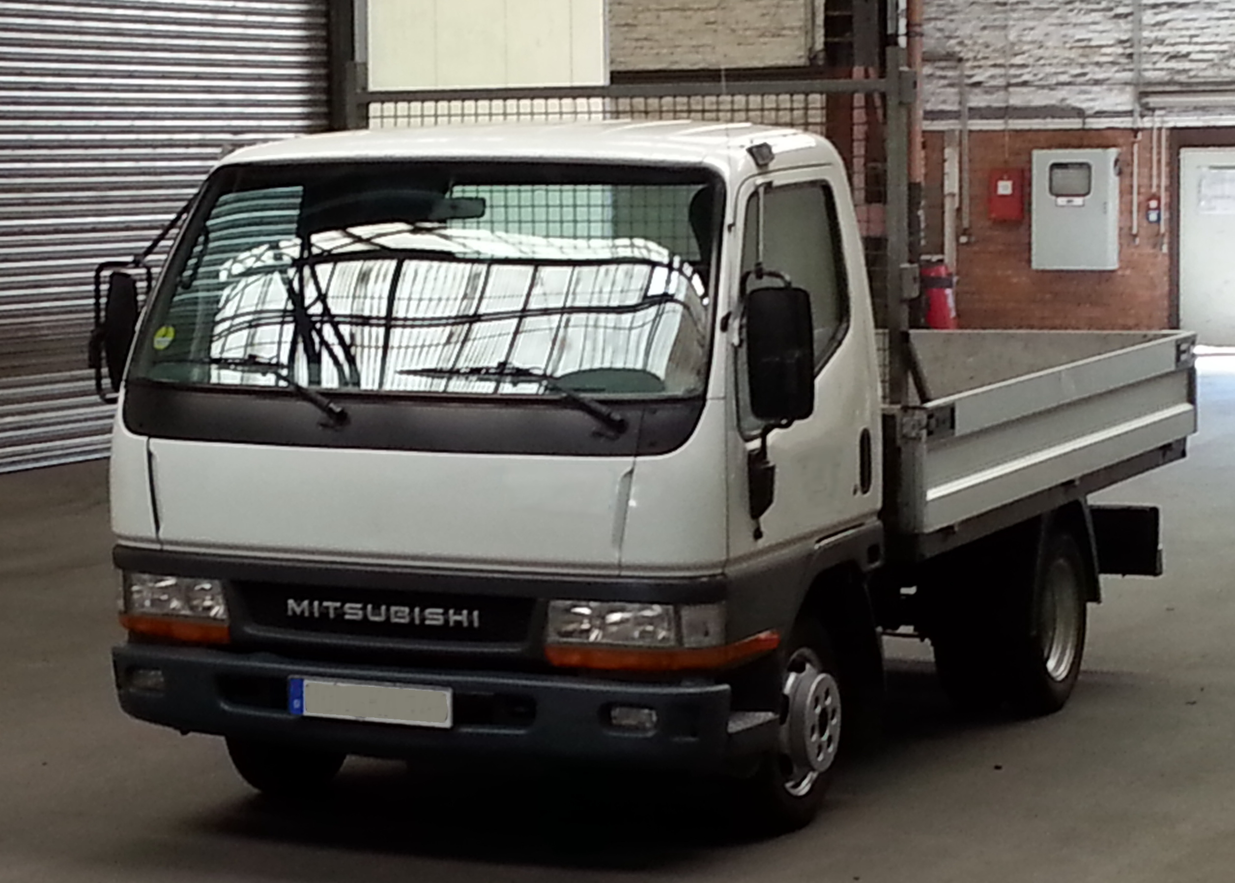 Mitsubishi Canter 35 ( Typ 6 )